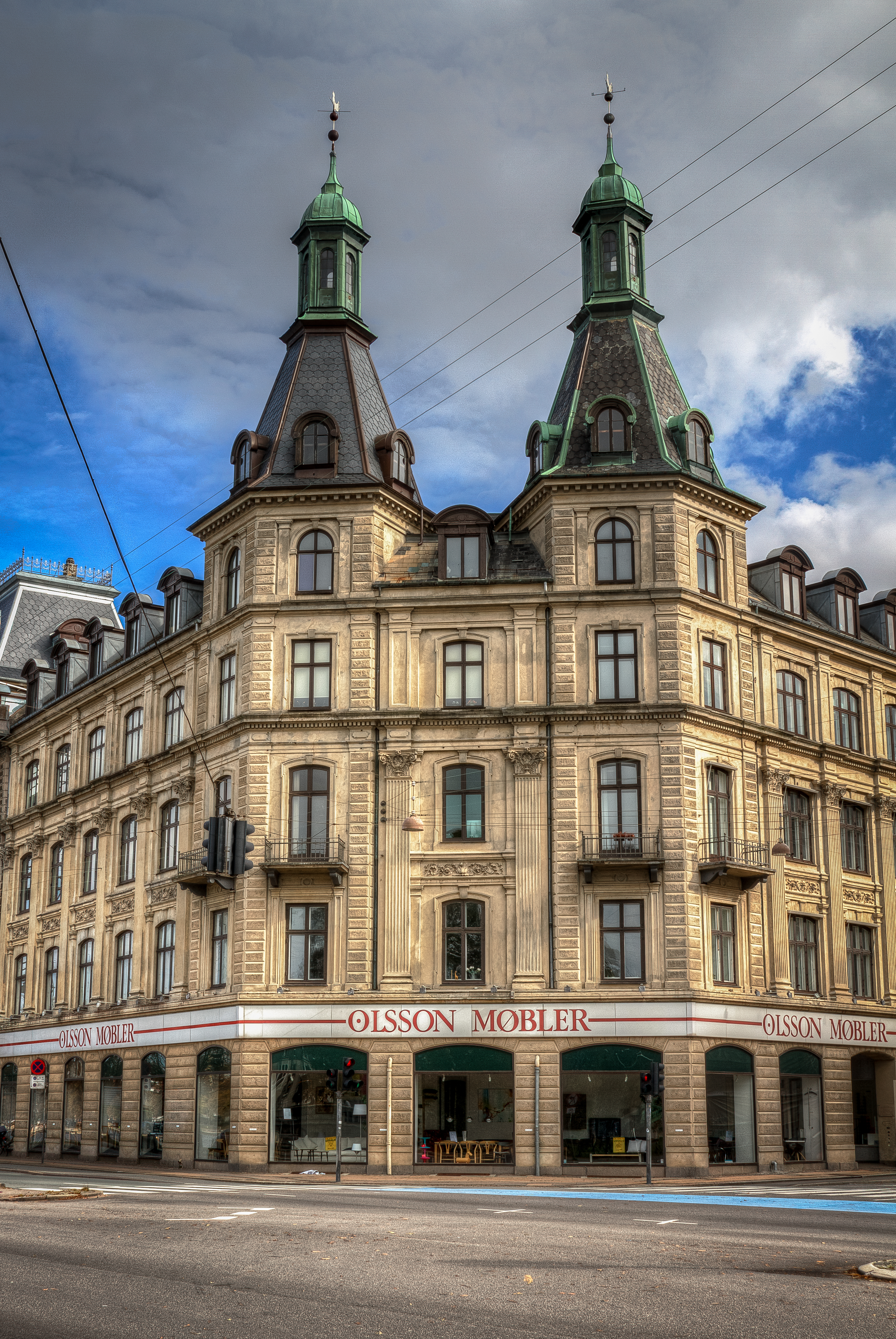 Søtorvet - Gothersgade 160